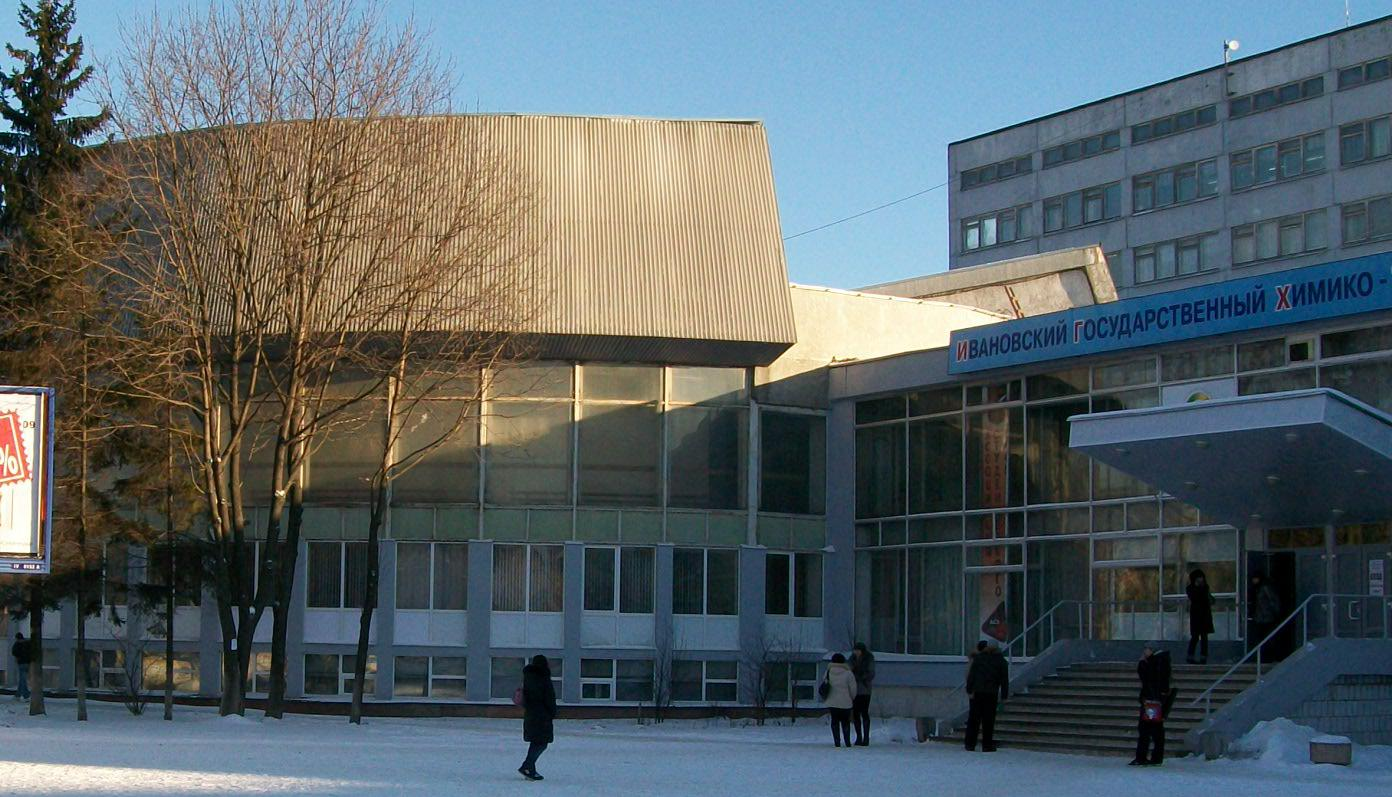 Иваново, ИГХТУ, корпуса Б и В